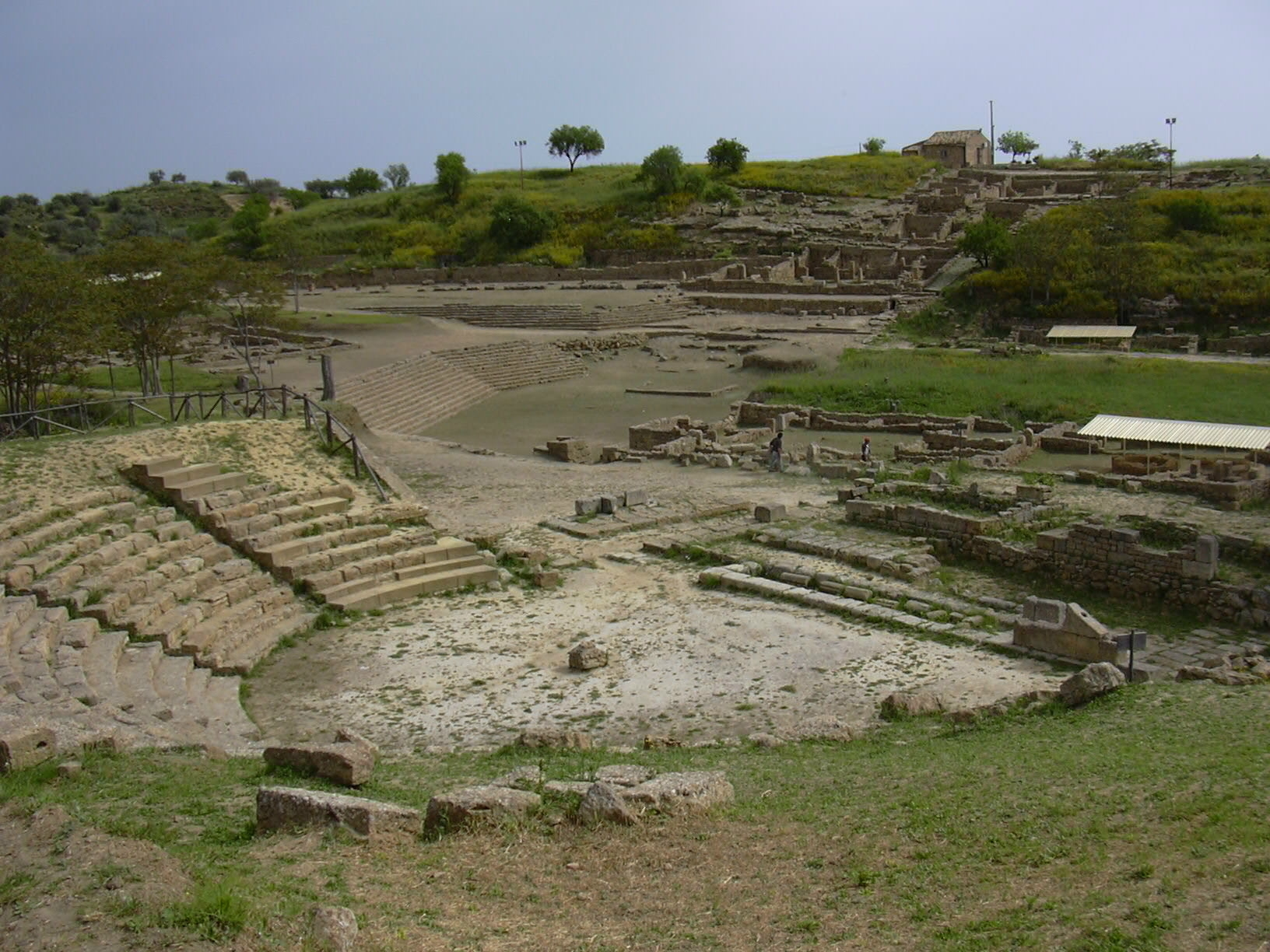 Morgantina-Sicilia: Panoramica: in primo piano il teatro, quindi il santuario della divinità ctonie, l'ekklesiasteron, l'abitato della collina est